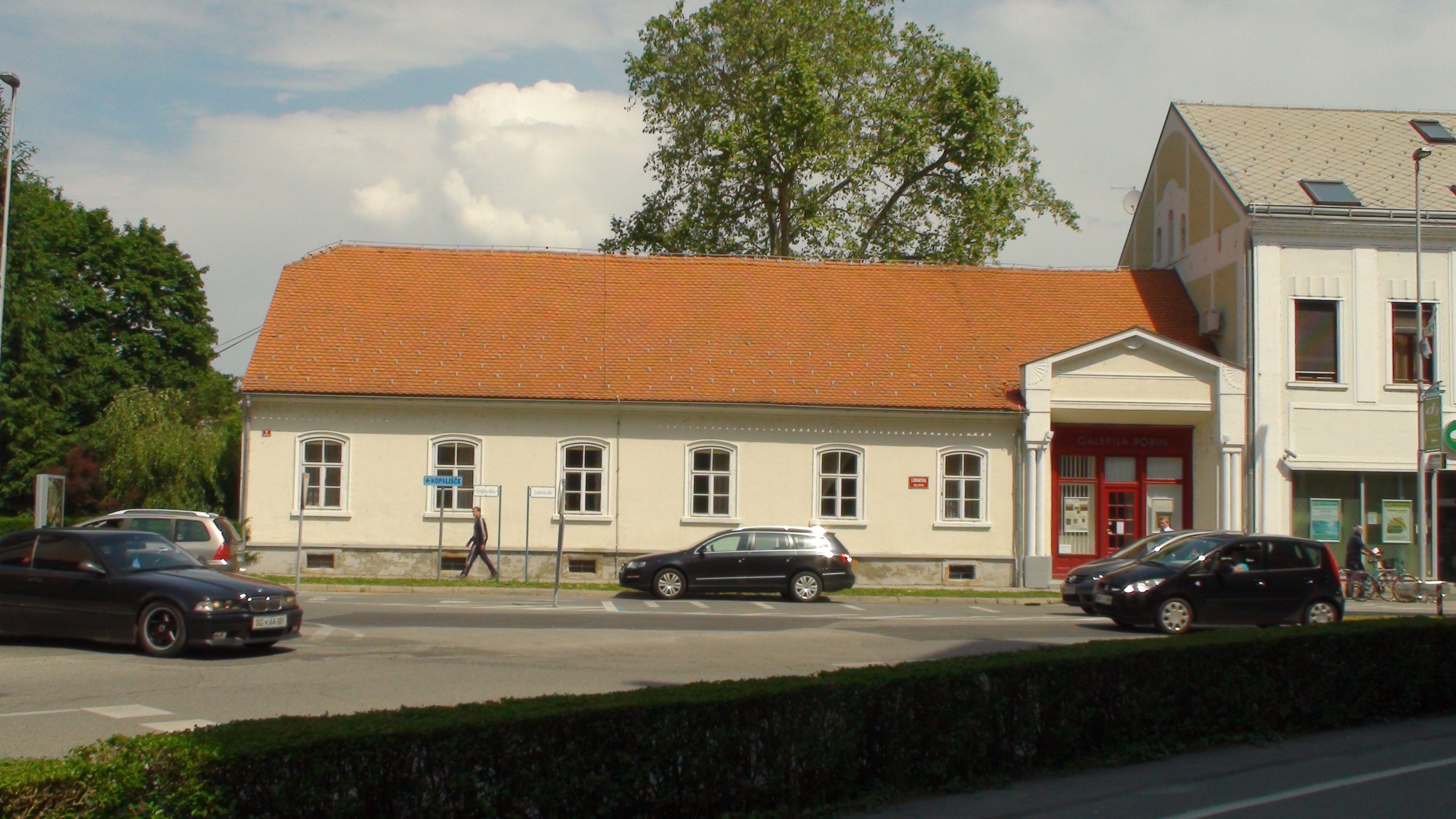 T.i. Berketova kuria, ki jo je dal zgraditi murskosoboški odvetnik, veleposestnik in ogrski poslanec Jozsef pl. Berke okoli 1850. V 30. letih jo je od Berkejev kupil industrialec in veleposestnik Josip Benko, ki je nato z druzino zivel v hisi. Prav tako je tukaj imela sedez Kreditna (oz. Benkotova) banka - zaradi tega je arhitektura malenkost spremenjena (vhodni portal na desni strani), vcasih je bil glavni vhod na drugi strani hise. Prav tako je del poslopja odstranjen na desni strani, zaradi enonadstropne stavbe, ki je bila kasneje postavljena. (kuria - majhen podezelski dvorec, oz, plemiska hisa)